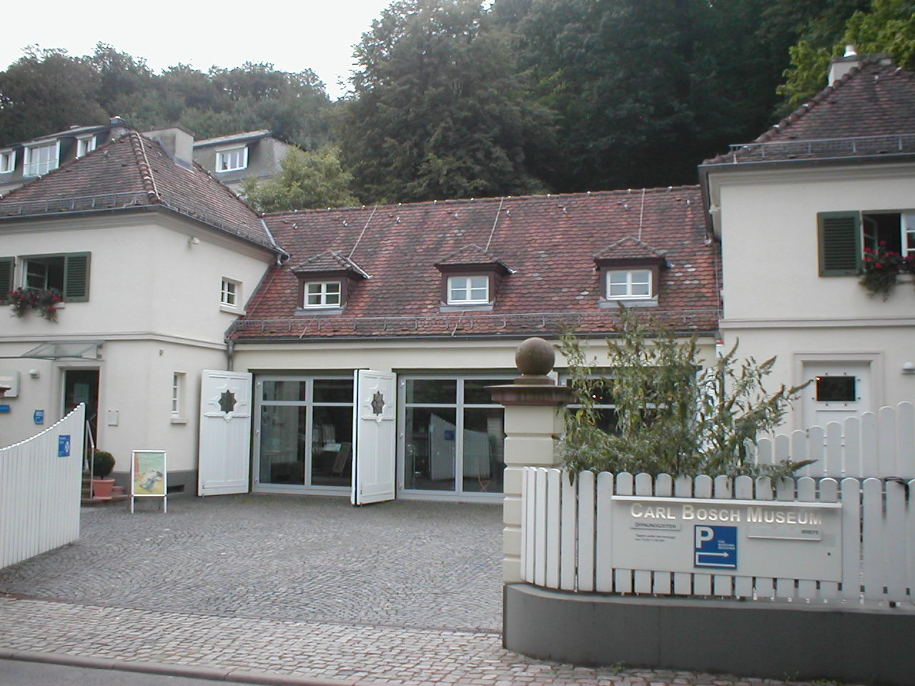 Carl-Bosch-Museum in Heidelberg. Das Museum befindet sich im Schloss-Wolfsbrunnenweg in unmittelbarer Nachbarschaft zu Boschs Wohnsitz, der Villa Bosch. Das Gebäude enthielt in der Mitte Boschs Garage, links und rechts waren Chauffeurwohnungen.